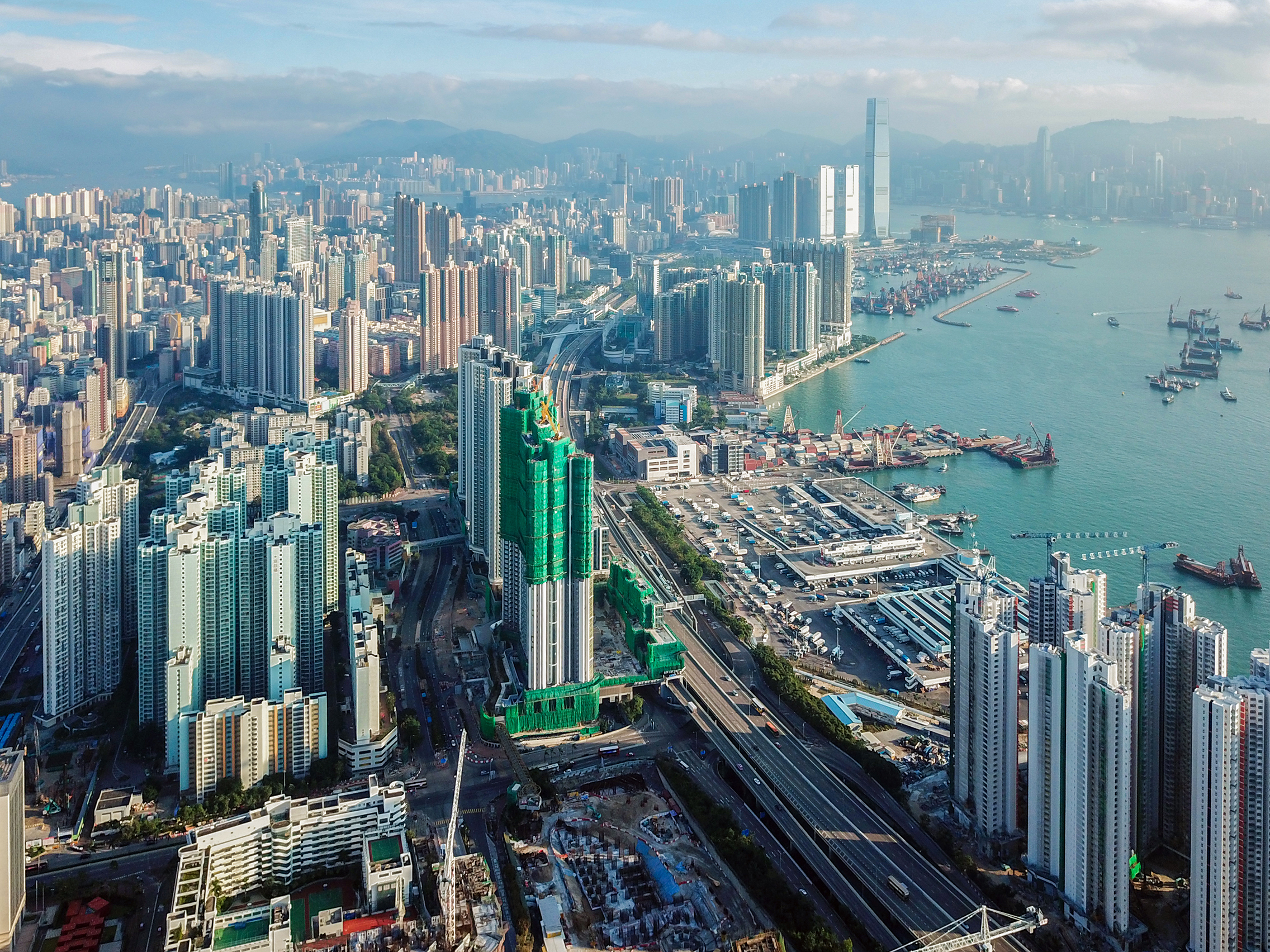 West Kowloon